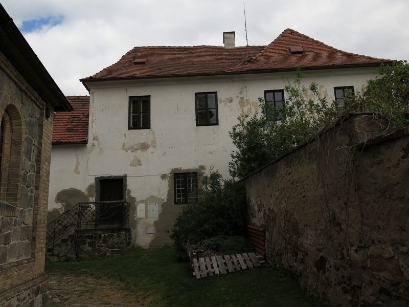 Fara, Hosín 17, Hosín.